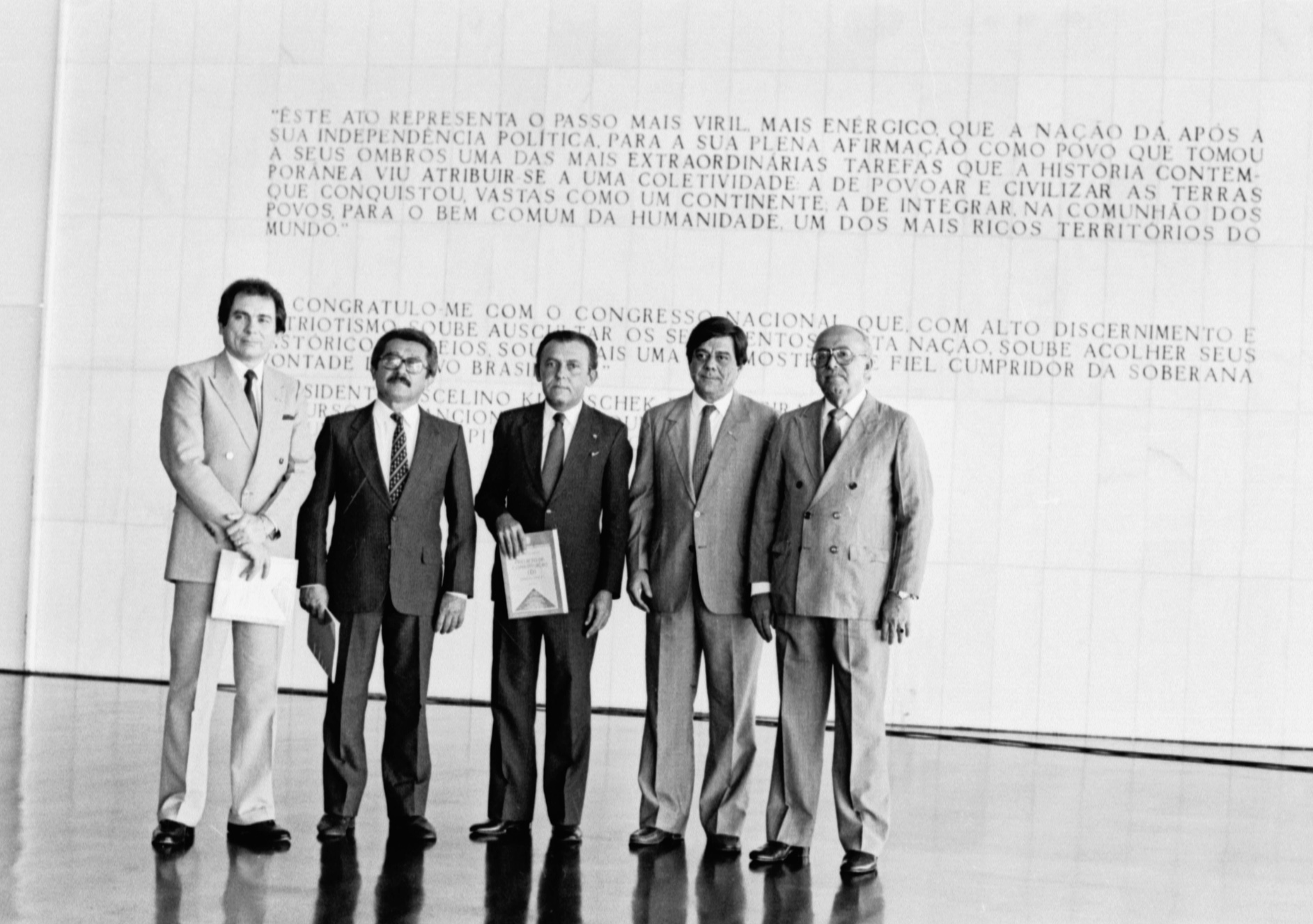 Assinatura da Constituição em 29/09/1988. Participantes - Senador Humberto Lucena, Raimundo Lira. Foto: Célio Azevedo